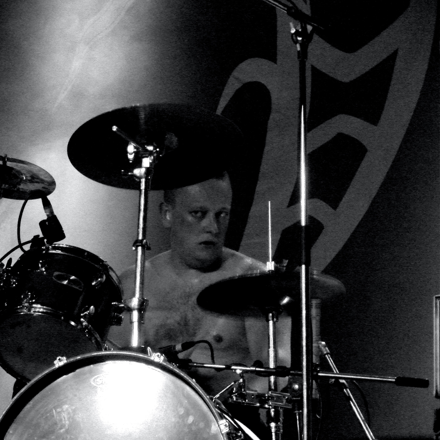 Vreid en concert à l'Elysée-Monmartre, Paris, le 2/12/2007. Steingrim à la batterie.